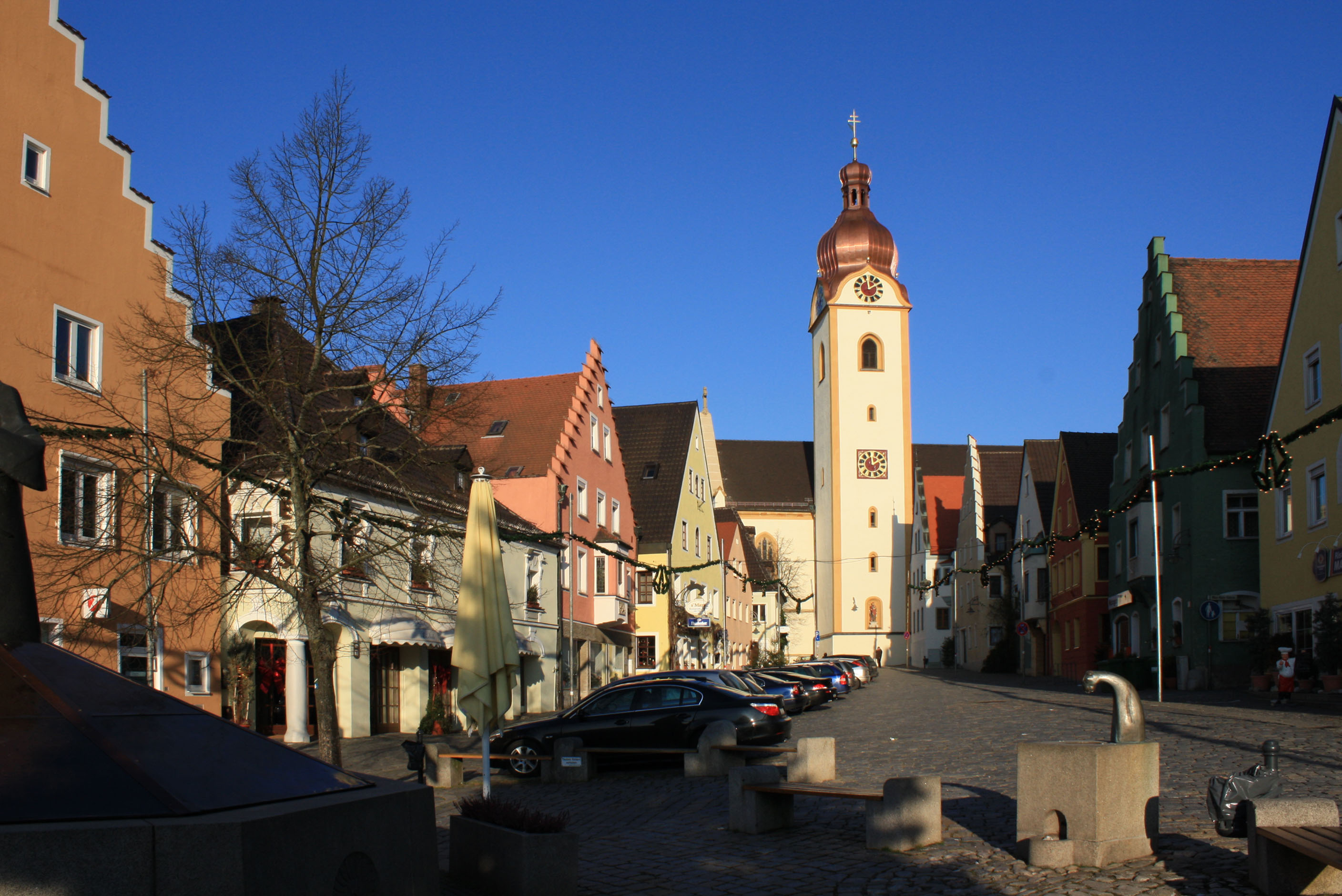 Oberer Marktplatz mit dem Turm der Kirche St. Jakob nach der Restauration